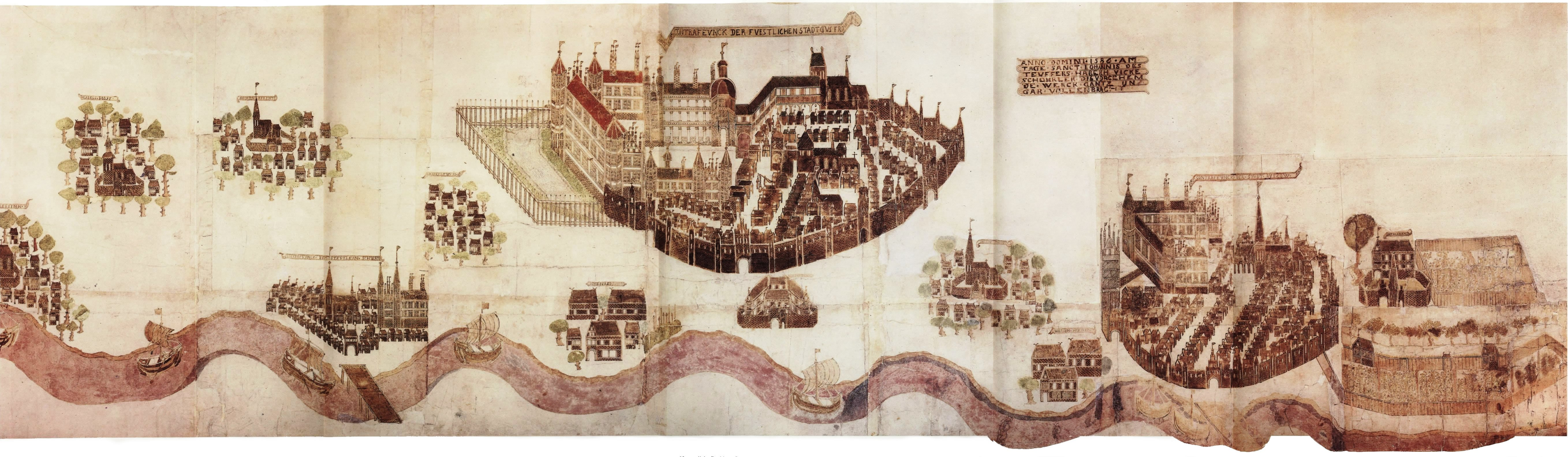 Vicke Schorler Rolle. Blatt 9/9